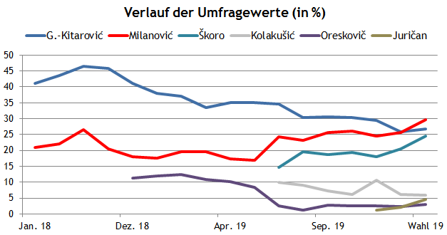 Präsidentschaftswahl Kroatien 19-20 Umfragen